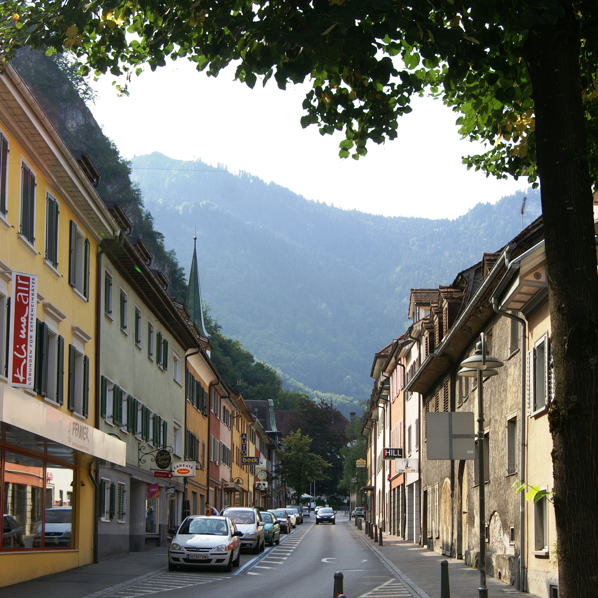 ein Teil der Marktstrasse Hohenems mit Blick ins Zentrum